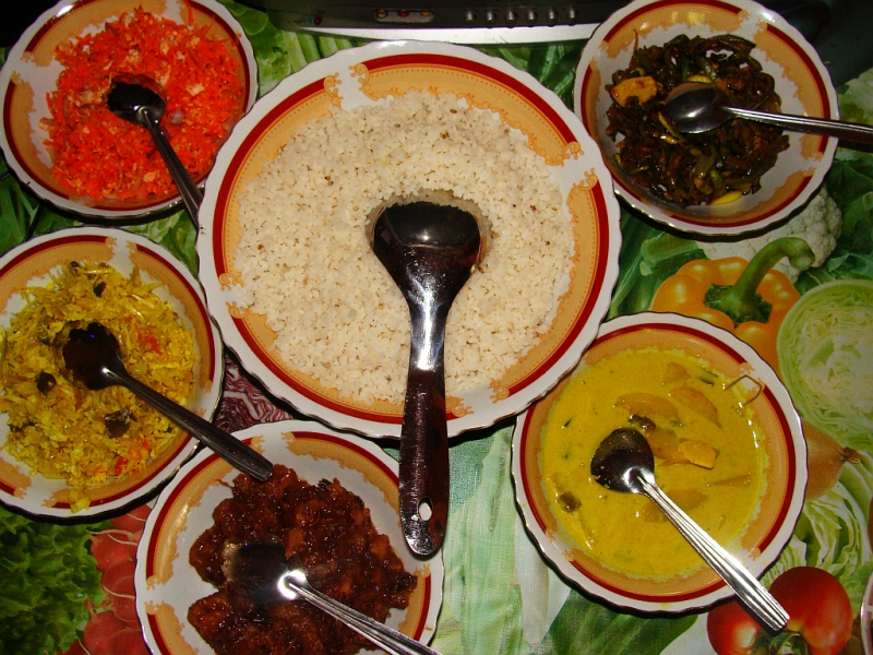 Sinhalesische Küche in Galle